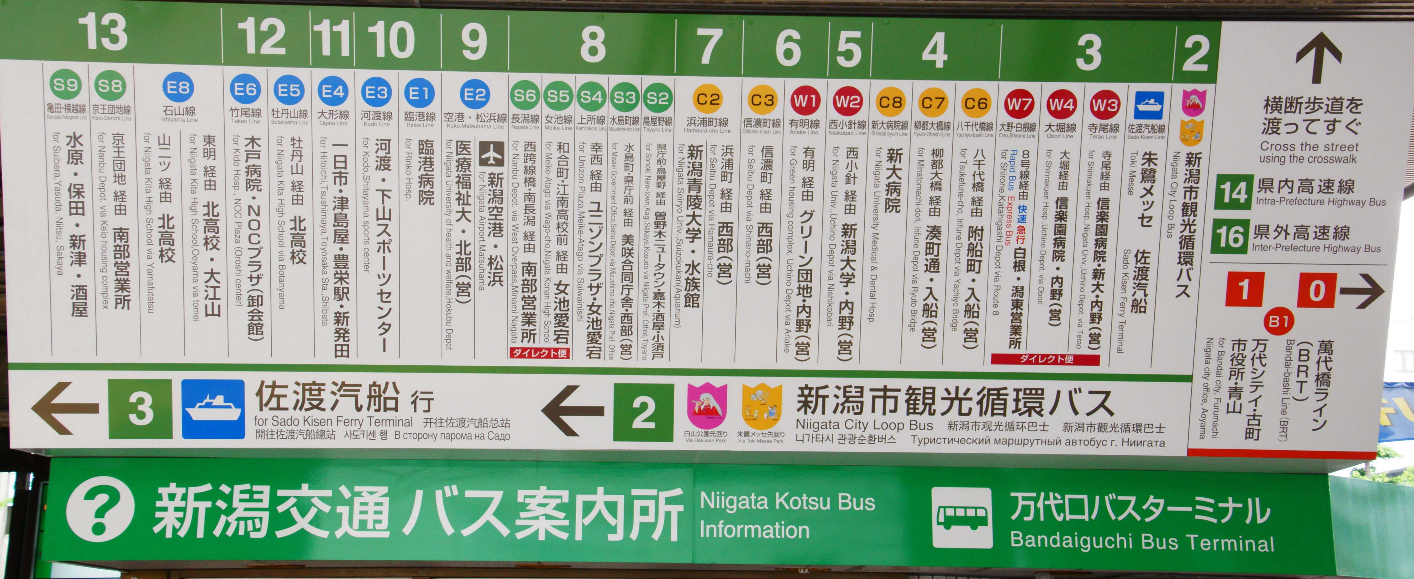 2016年6月の新潟駅万代口バスターミナル案内板。